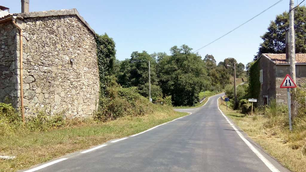 Vista da Ponte, Curtis.